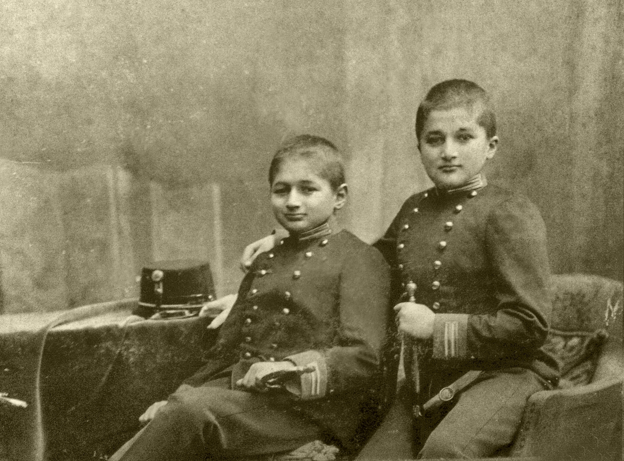 Alexander und Constantin Wassilko von Serecki 1903 im Theresianum, Söhne des Grafen Georg Wassilko von Serecki und der Elisa von Ohanowicz